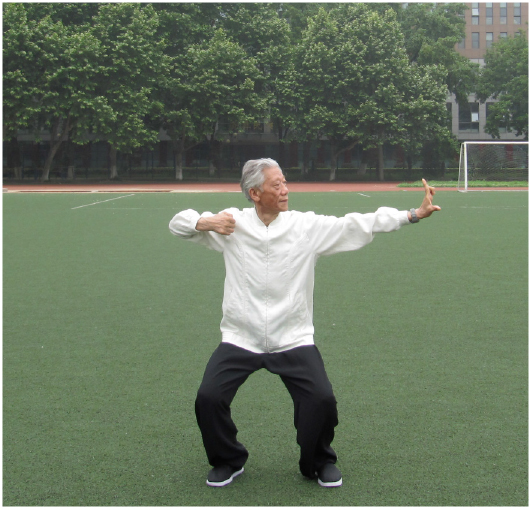 Abschnitt 2: Den Bogen spannen und auf den Geier zielen